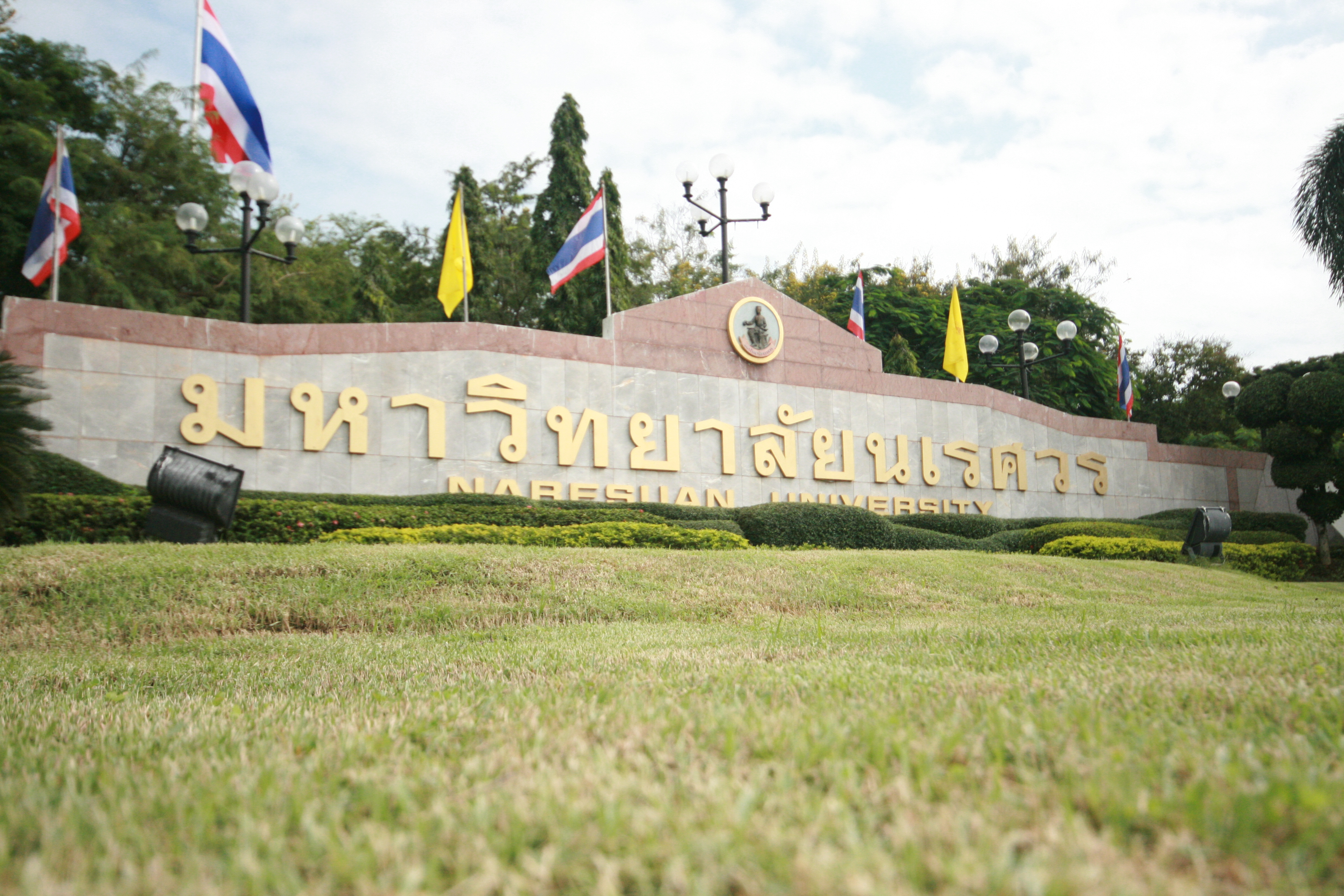 ด้านหน้ามหาวิทยาลัยนเรศวร